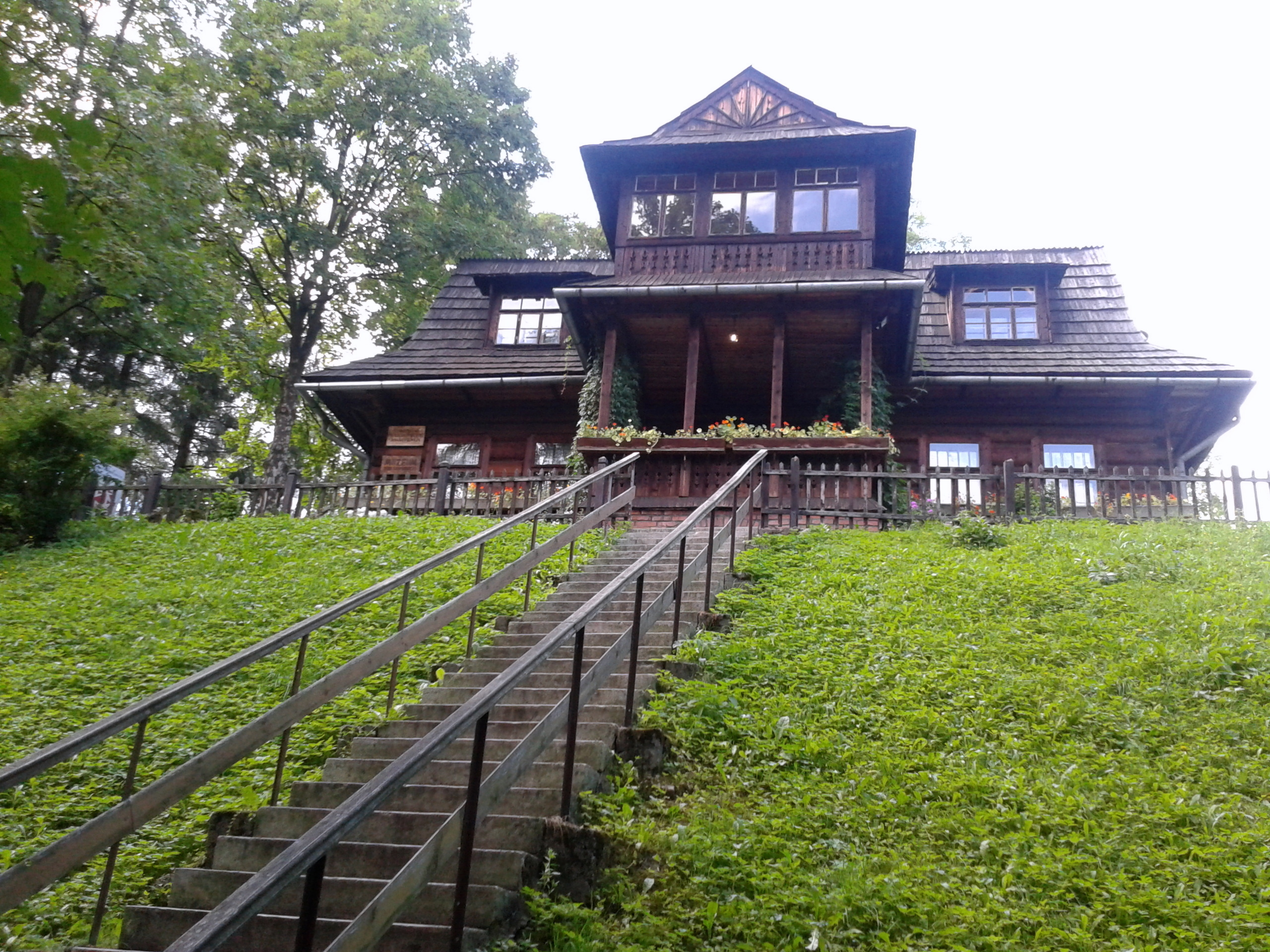 Zakopane, willa Harenda, ob. Muzeum Jana Kasprowicza, 1920